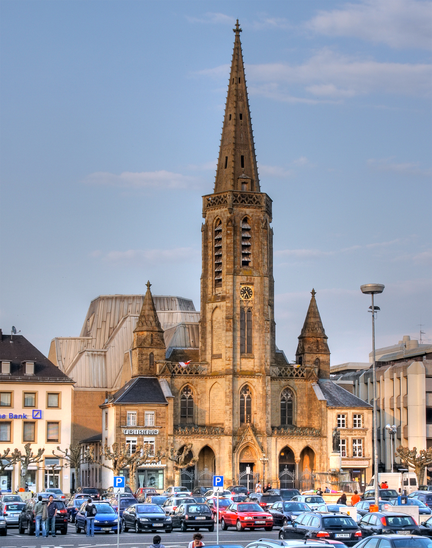 Ludwigskirche in Saarlouis, Architekt Kirchenschiff: Gottfried Böhm